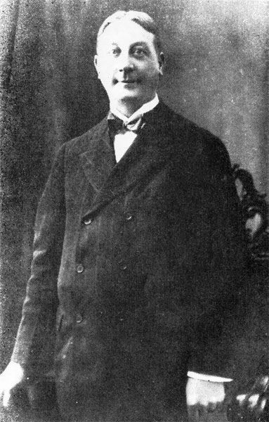 Albert Giesecke (1883-1968), maestro estadounidense, rector de la Universidad Nacional del Cuzco, de 1910 a 1923.